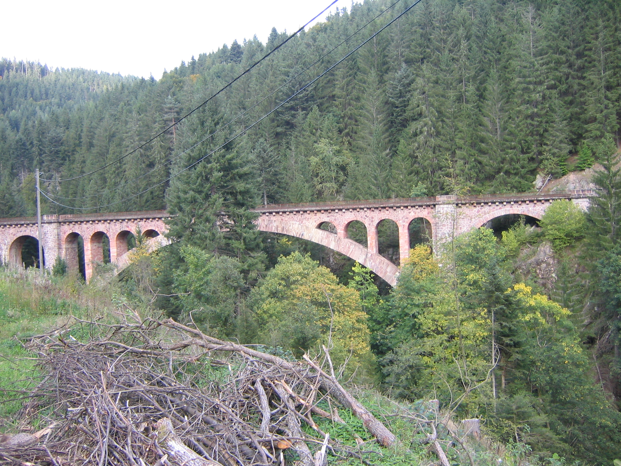 Viadukt der Höllentalbahn über die Gutach